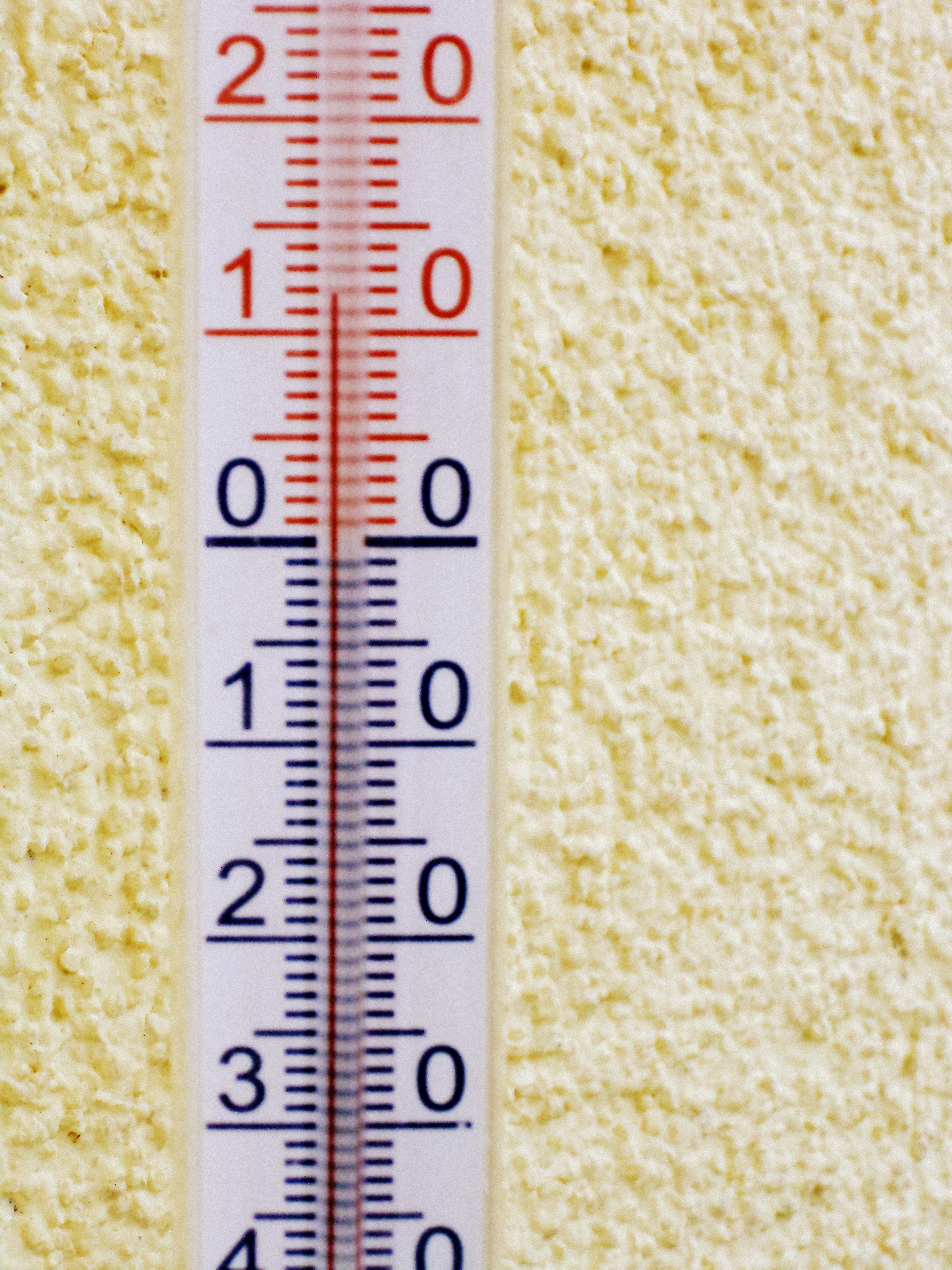 Skala Celsjusza